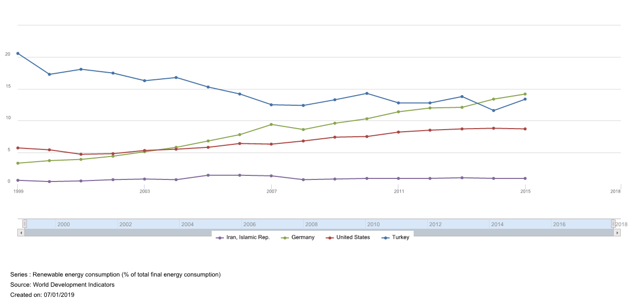 renewable energy